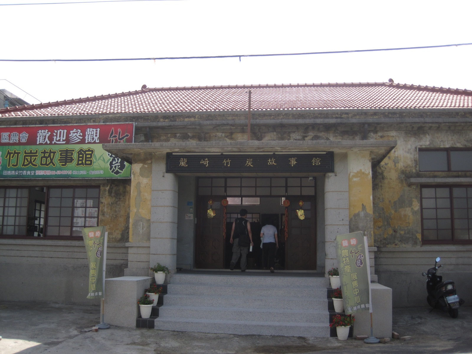 龍崎竹炭故事館，也是原龍崎鄉公所